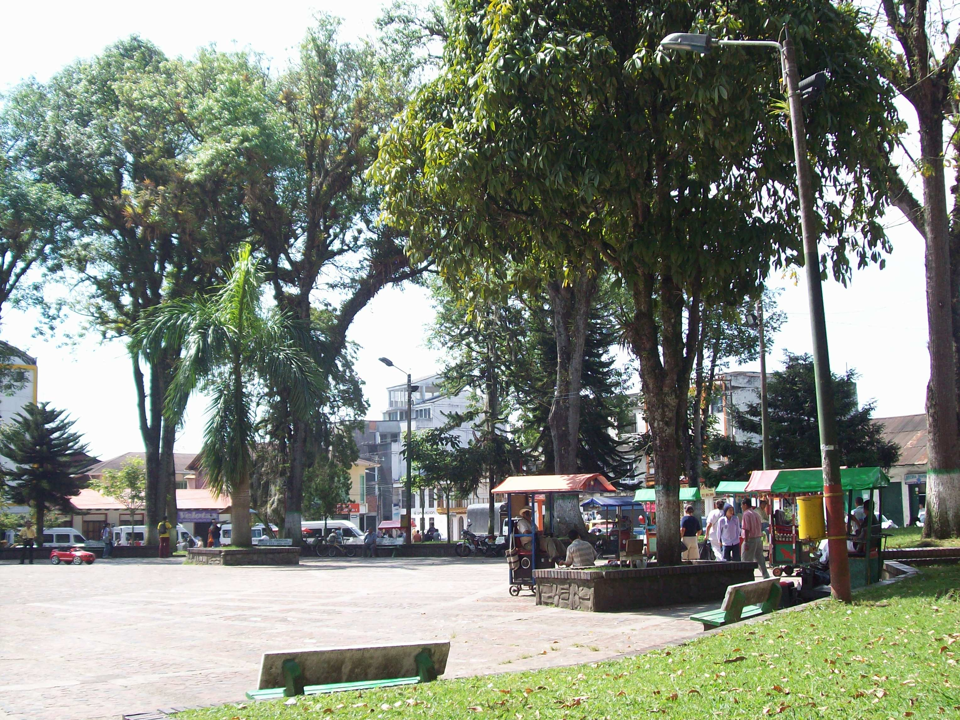 El parque donde esta el cafè, el almacen de compras y los sitios mas reconocidos de este bello Pueblo.